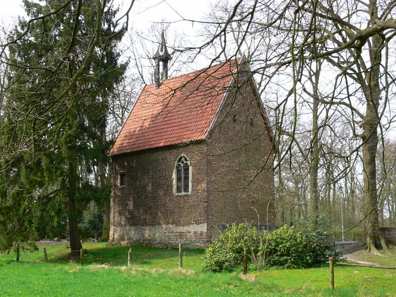 Die Ritter der Burg Vischering erhielten 1317 die Erlaubnis eine Kapelle zu errichten. Die jetzige stammt von 1495.